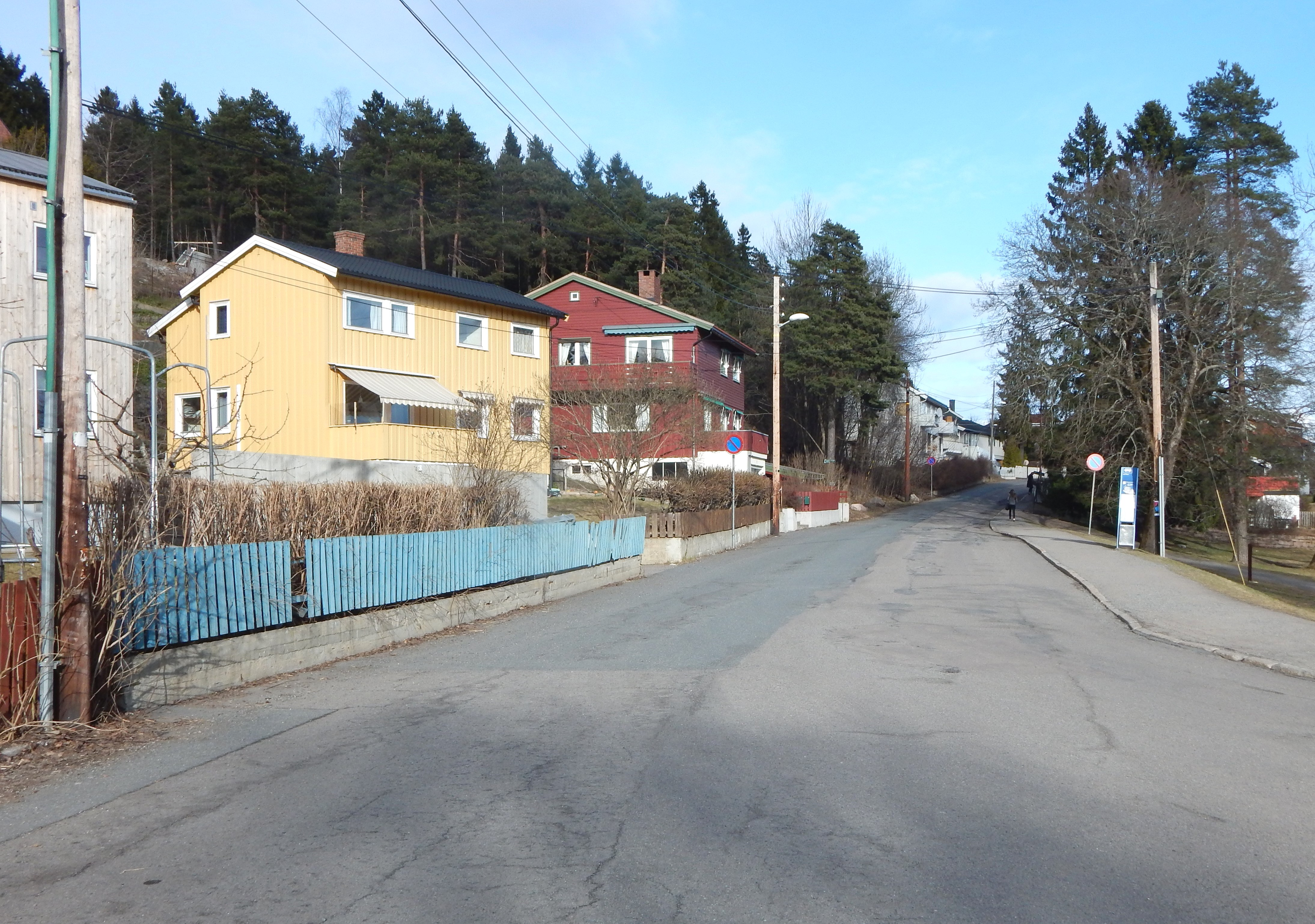 Kildeveien østover fra Mons Søviks plass